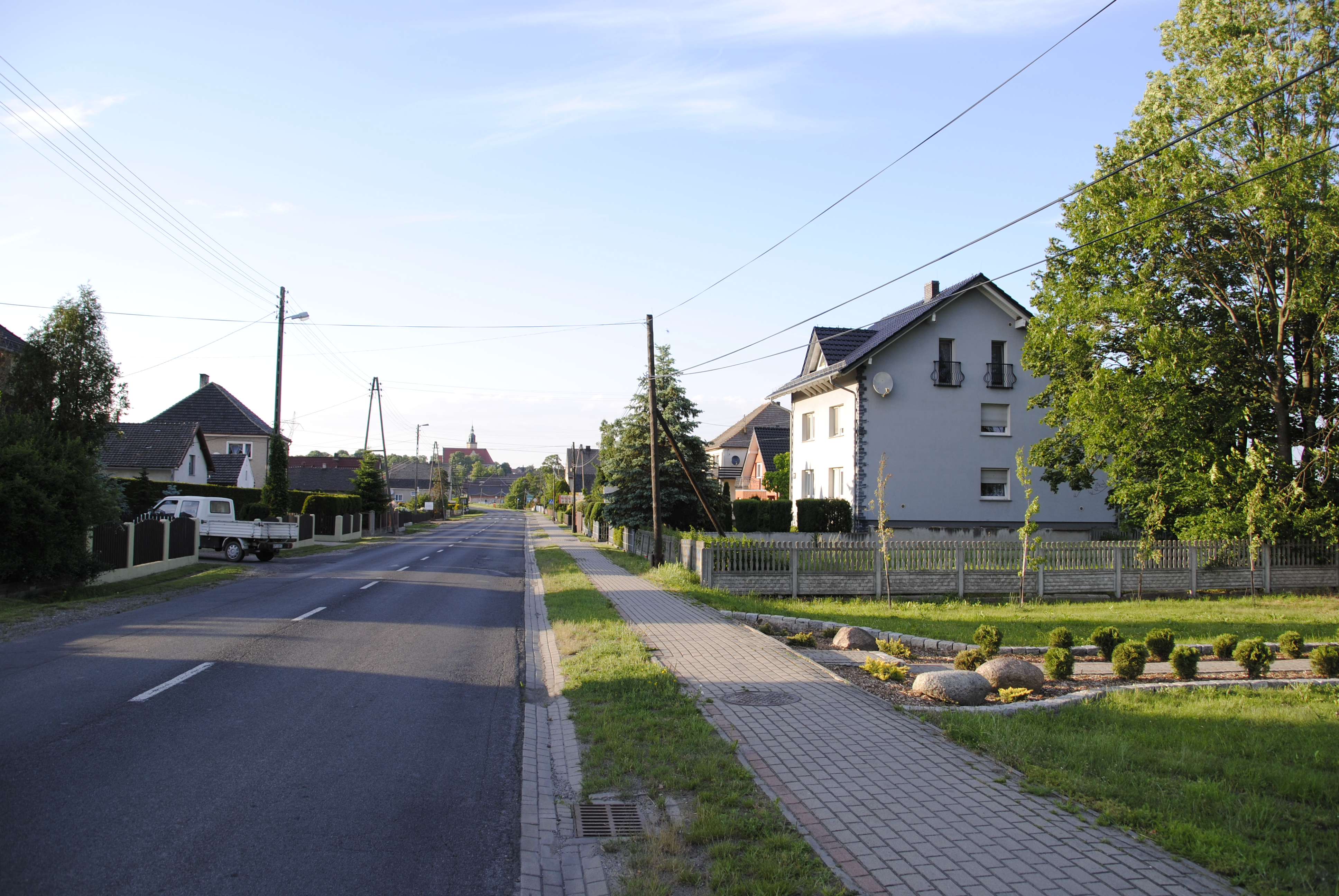 ul Opolska in Zlattnik Kreis Oppeln